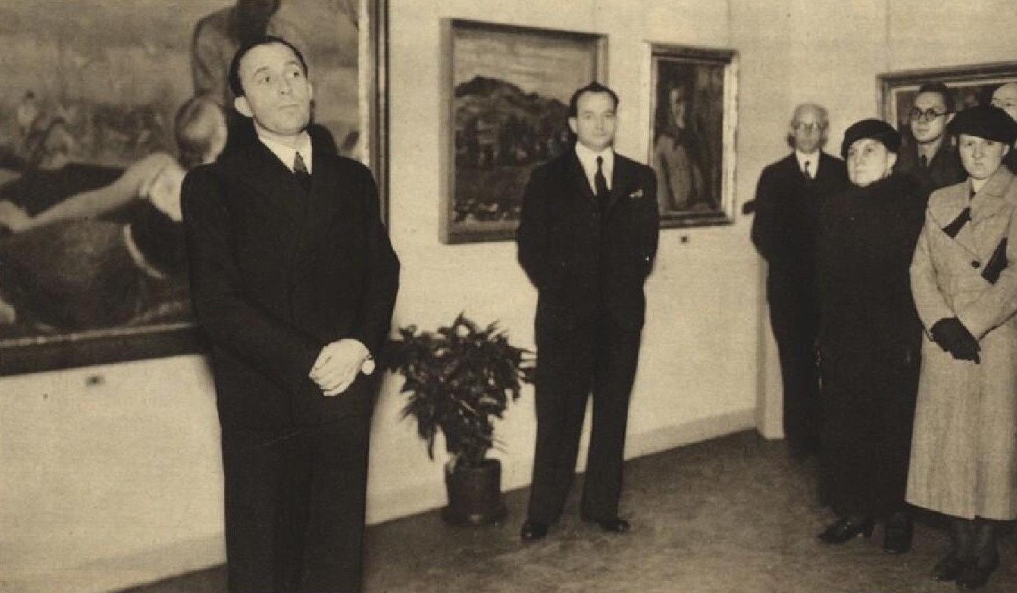 Jaroslav Malínský (1897-1979), český akademický malíř